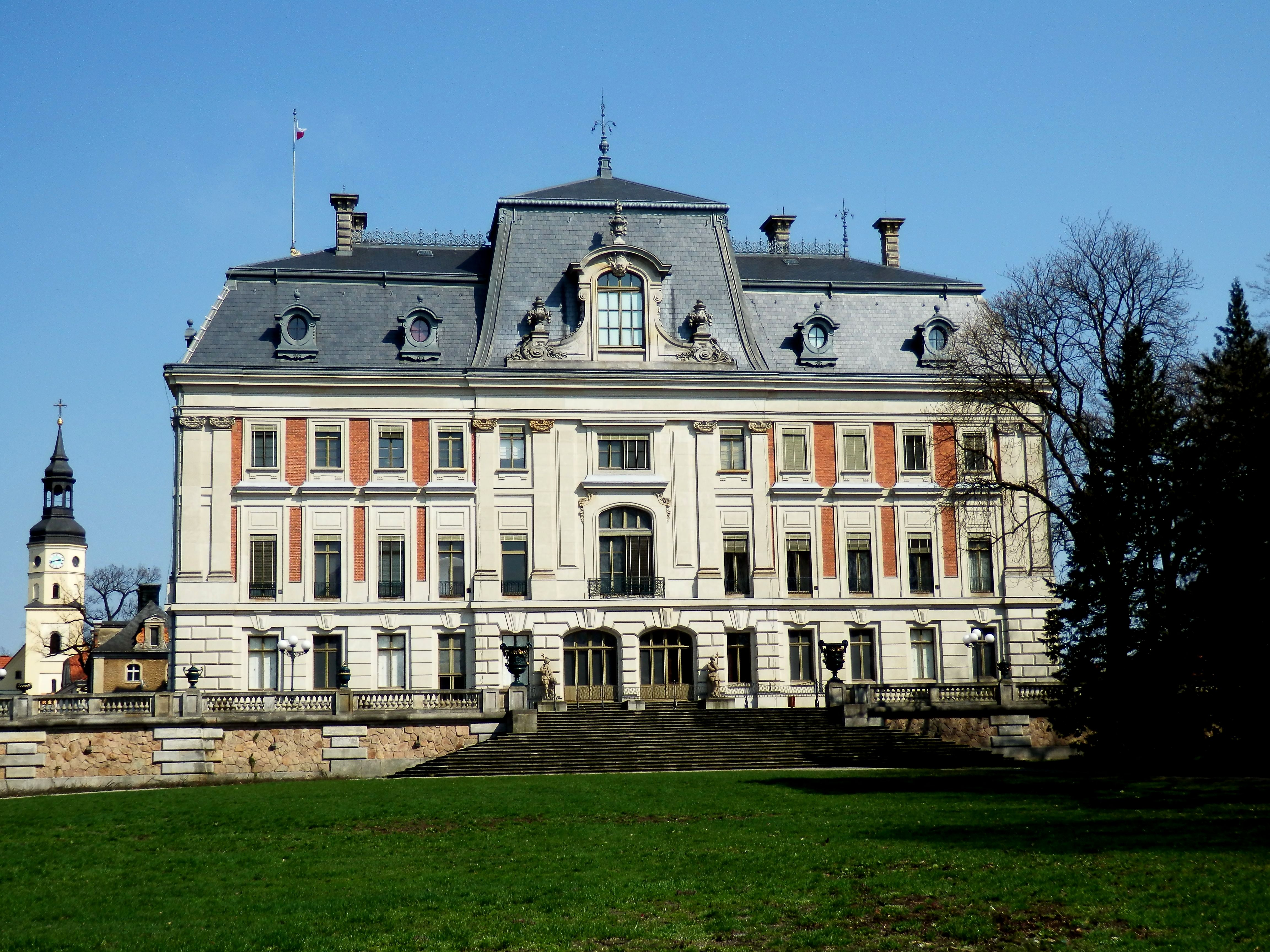 Pszczyna, zespół pałacowy, XVII w., XX w.